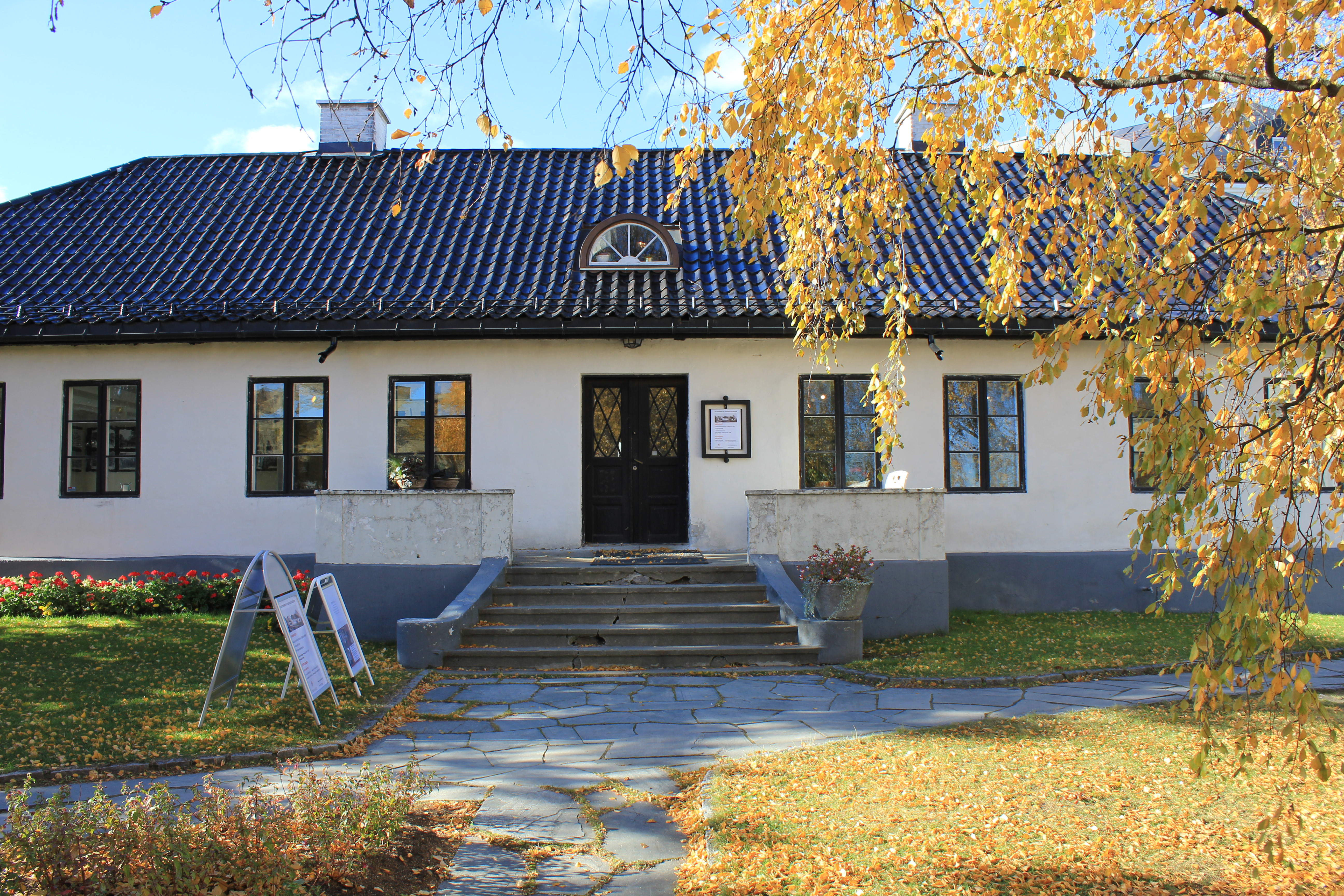 Kauffeldtgården på Gjøvik.